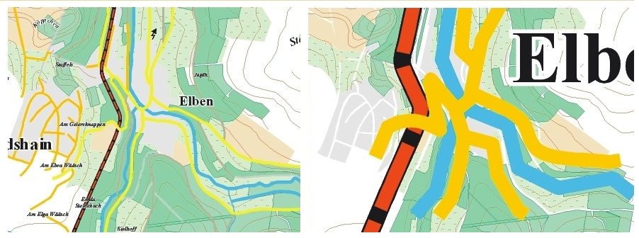 Kartographische Generalisierung: Verbreitern von Signaturen zur Darstellung im kleineren Folgemaßstab führt zu Verdrängung.